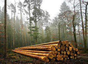 Holznutzung im Embracher Wald